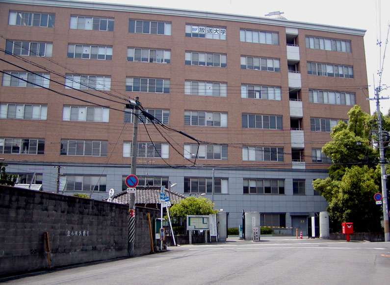 大阪教育大学天王寺キャンパス（大阪市天王寺区南河堀町）。中央館（正面茶色の建物）は、1-5階が大阪教育大学、6-7階は放送大学大阪学習センターとなっている。2007年5月、同キャンパス正門前から投稿者が撮影。